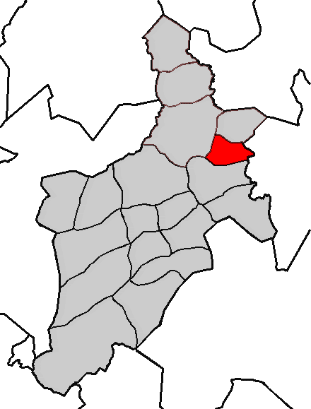 Situación da parroquia de Cos no concello de Abegondo